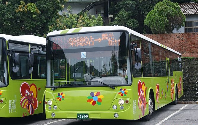 大都會客運聯營285經吉林路副線低地板公車347-FR